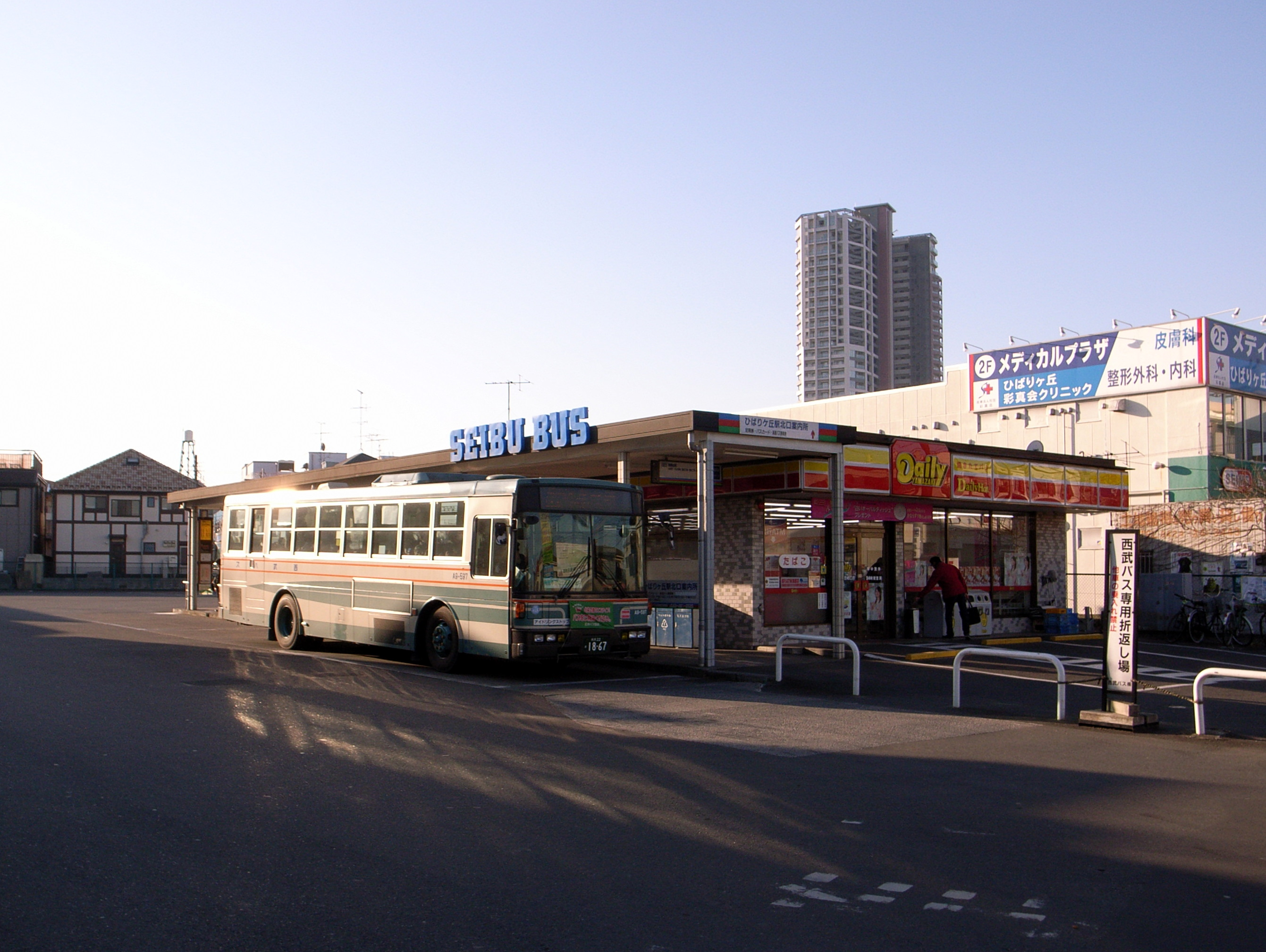 ひばりが丘駅北口バス停